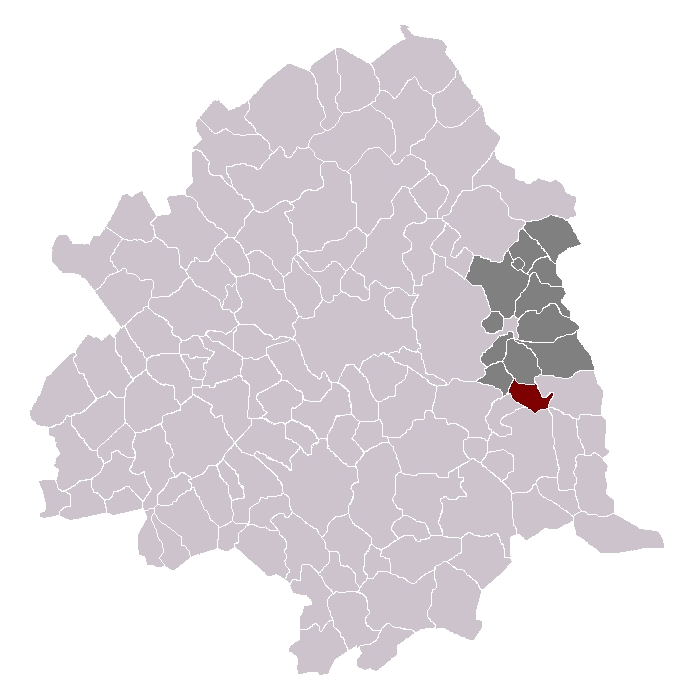 Gruson dans son canton et son arrondissement.